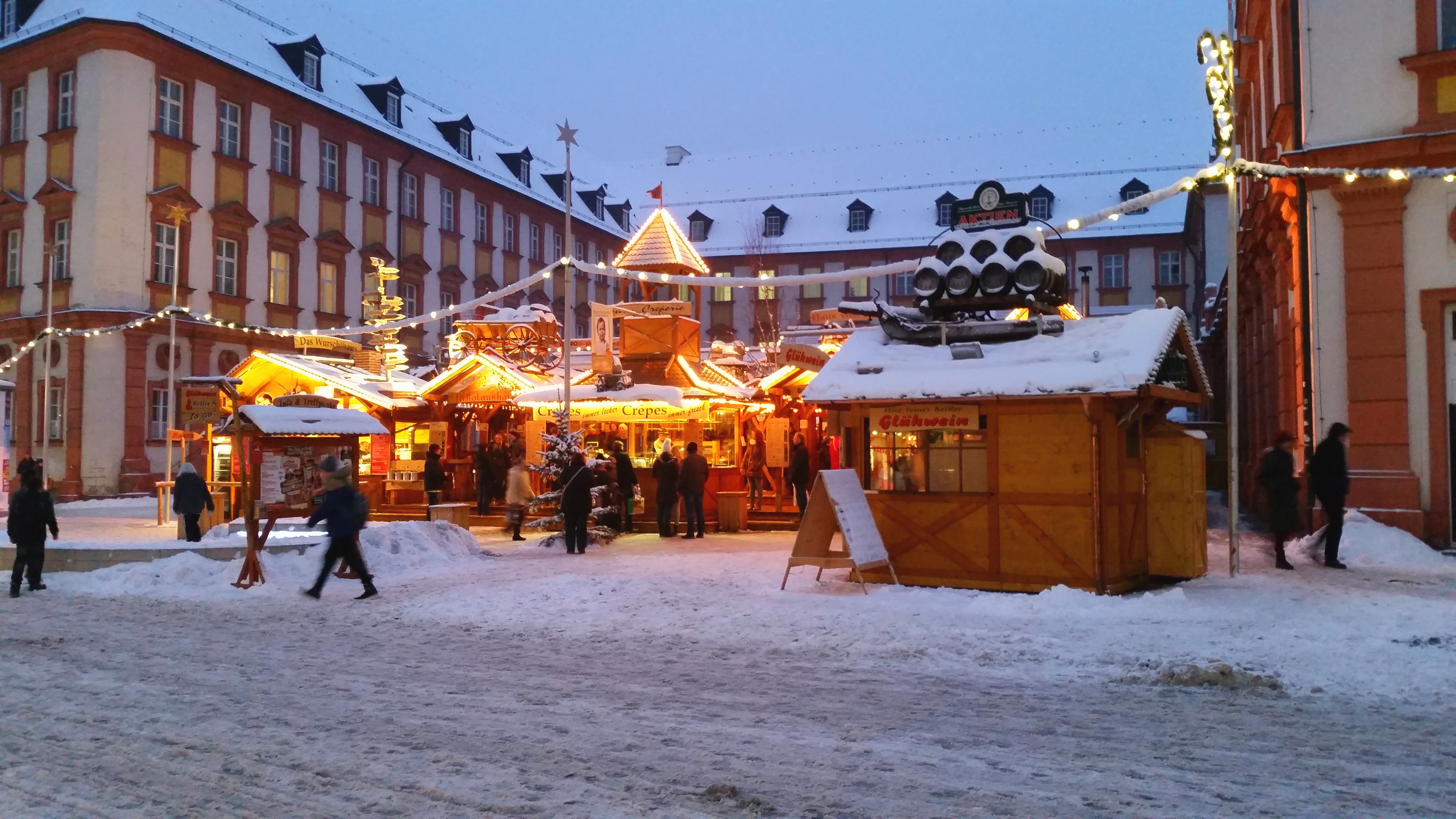 Das Bayreuther Winterdorf 2014 auf dem Platz vor dem Alten Schloss in der Fußgängerzone